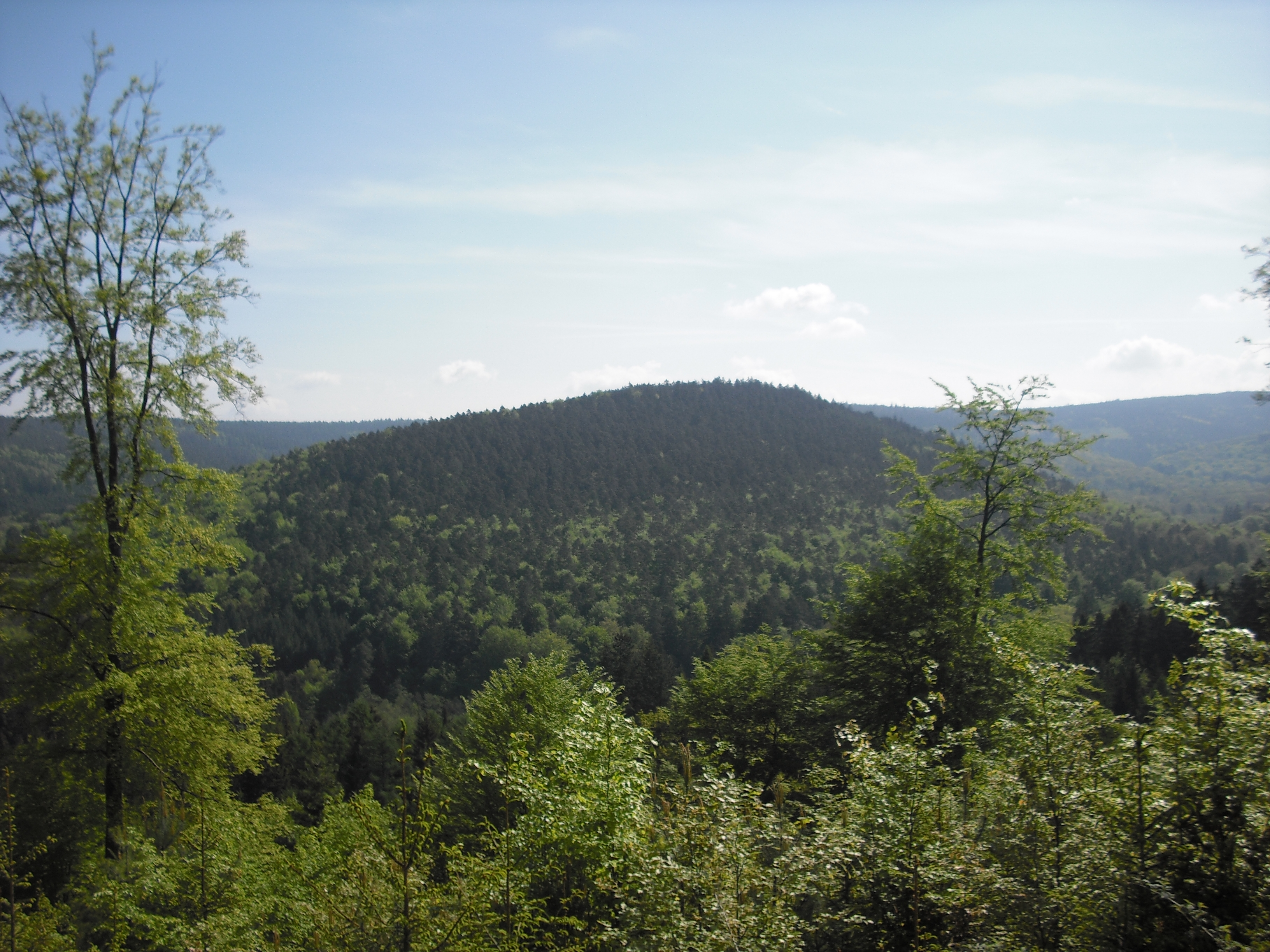 Alteburg bei Biebergemünd-Kassel. Es handelt sich um einen alten keltischen Ringwall.